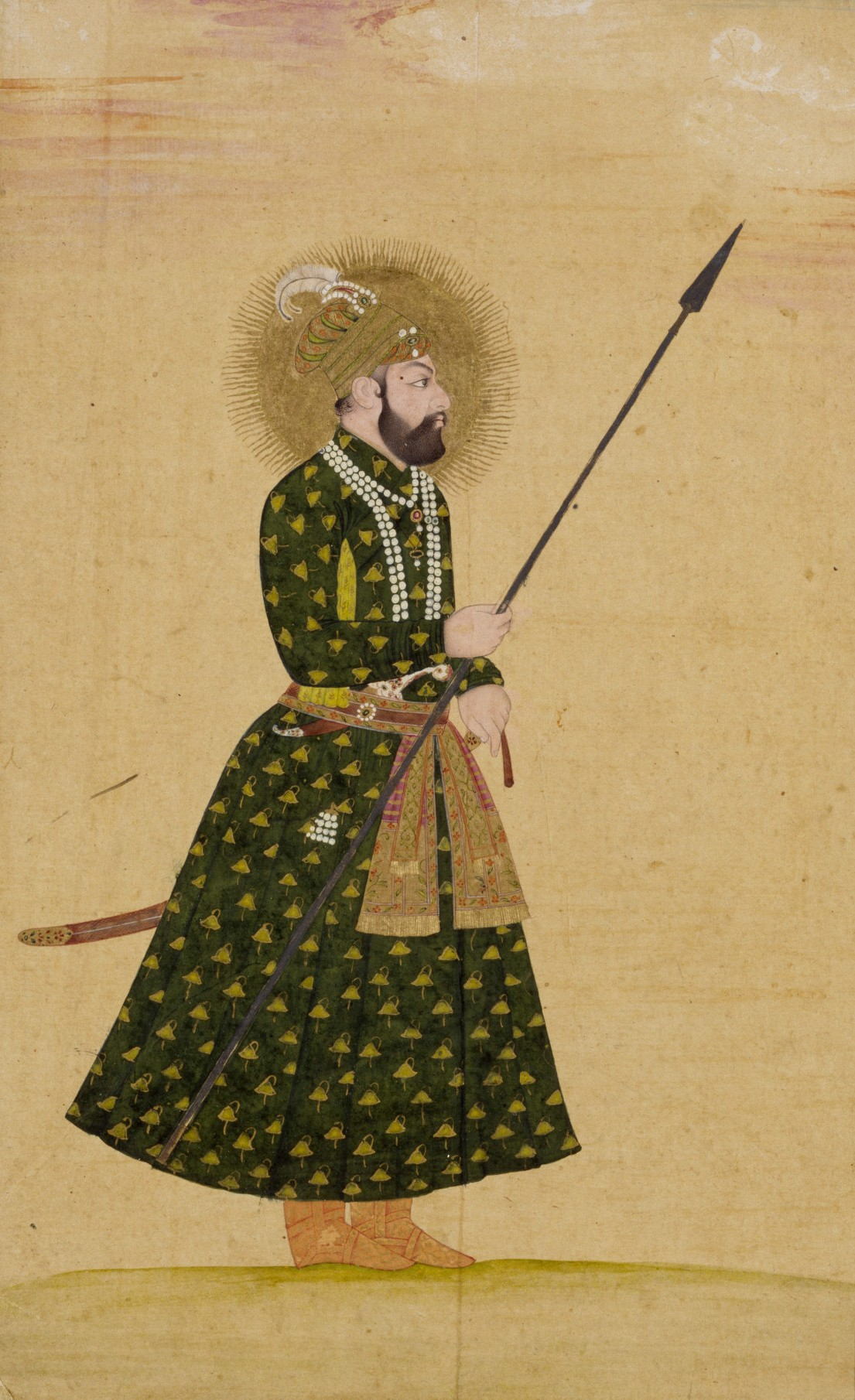 Jahandar Shah, Mughal Emperor. Watercolour on paper. India, Mughal period, c.1712.